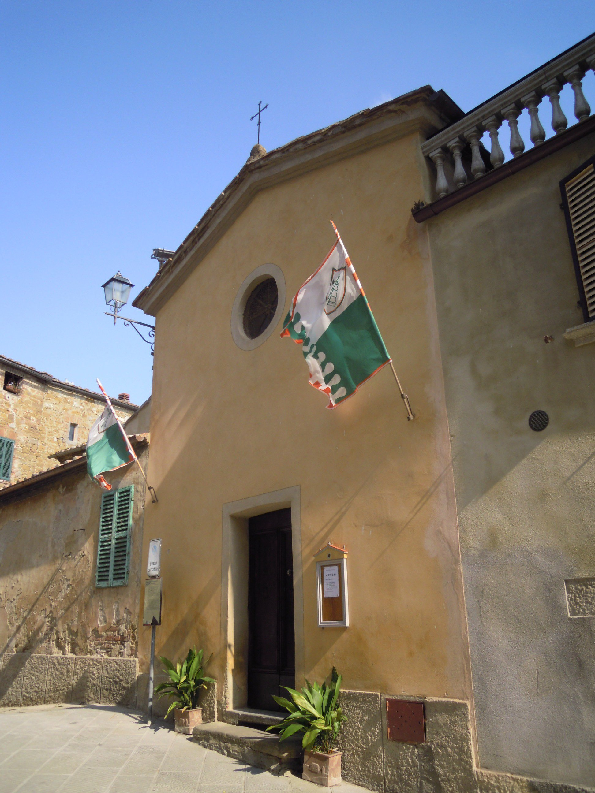 Scorcio della facciata dell'Oratorio di Sant'Antonio Abate della Compagnia del Santissimo Sacramento di Montisi, in provincia di Siena.